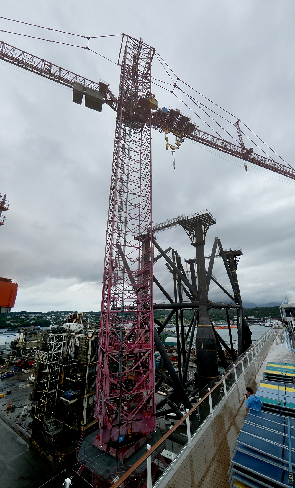 Großer Turmkran zum Abwracken von Schiffen und Bohrplattformen auf der Halbinsel Eldøyane bei Leirvik (Norwegen)